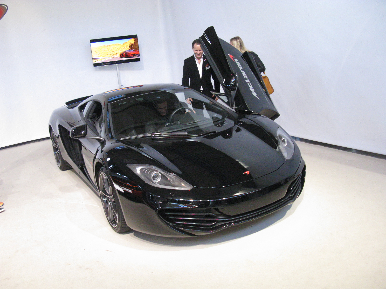 McLaren MP4-12C